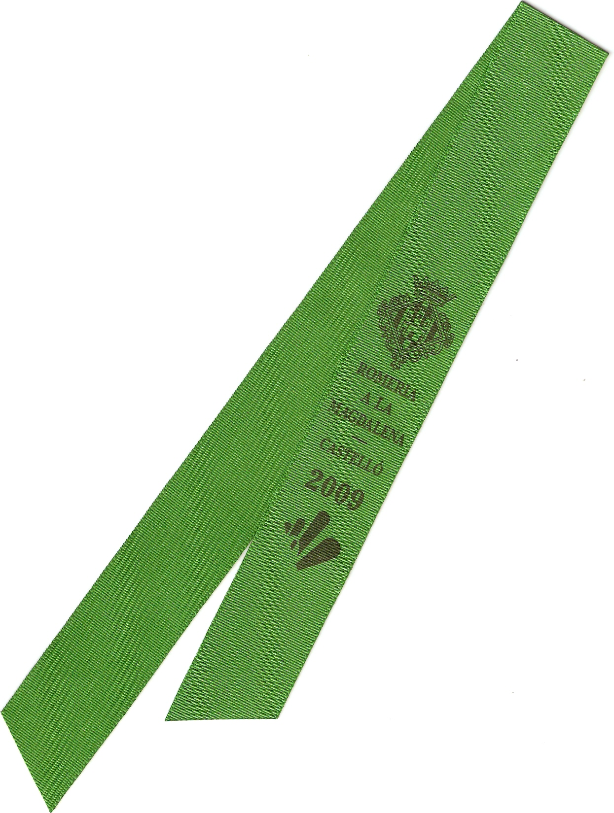 Cinta típica de las Fiestas de la Magdalena, Castellón de la Plana, España.